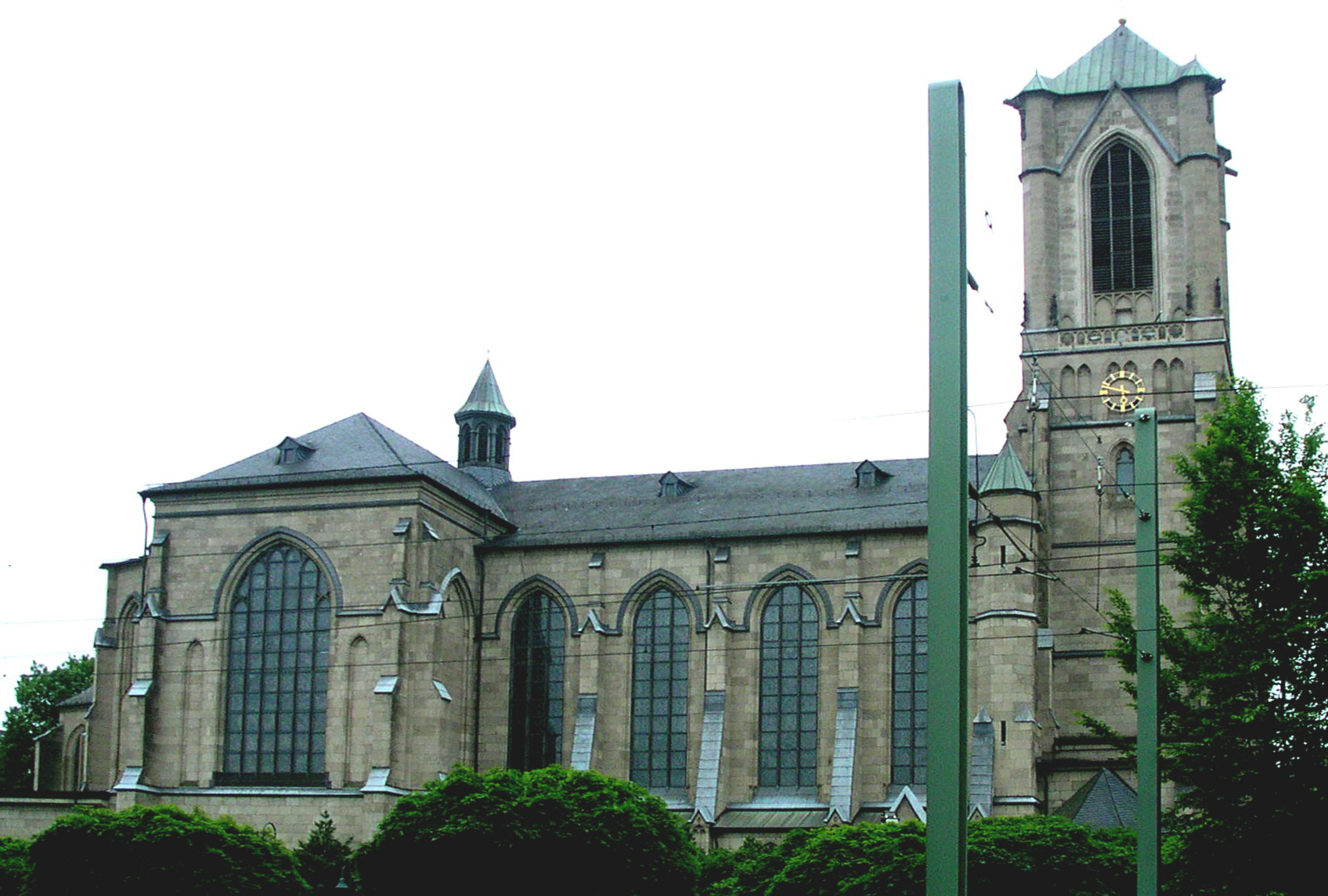 Katholische Pfarrkirche St. Marien. Leider Fahrdraht und Mast der Straßenbahn davor. Die Perspektive habe ich entzerrt.